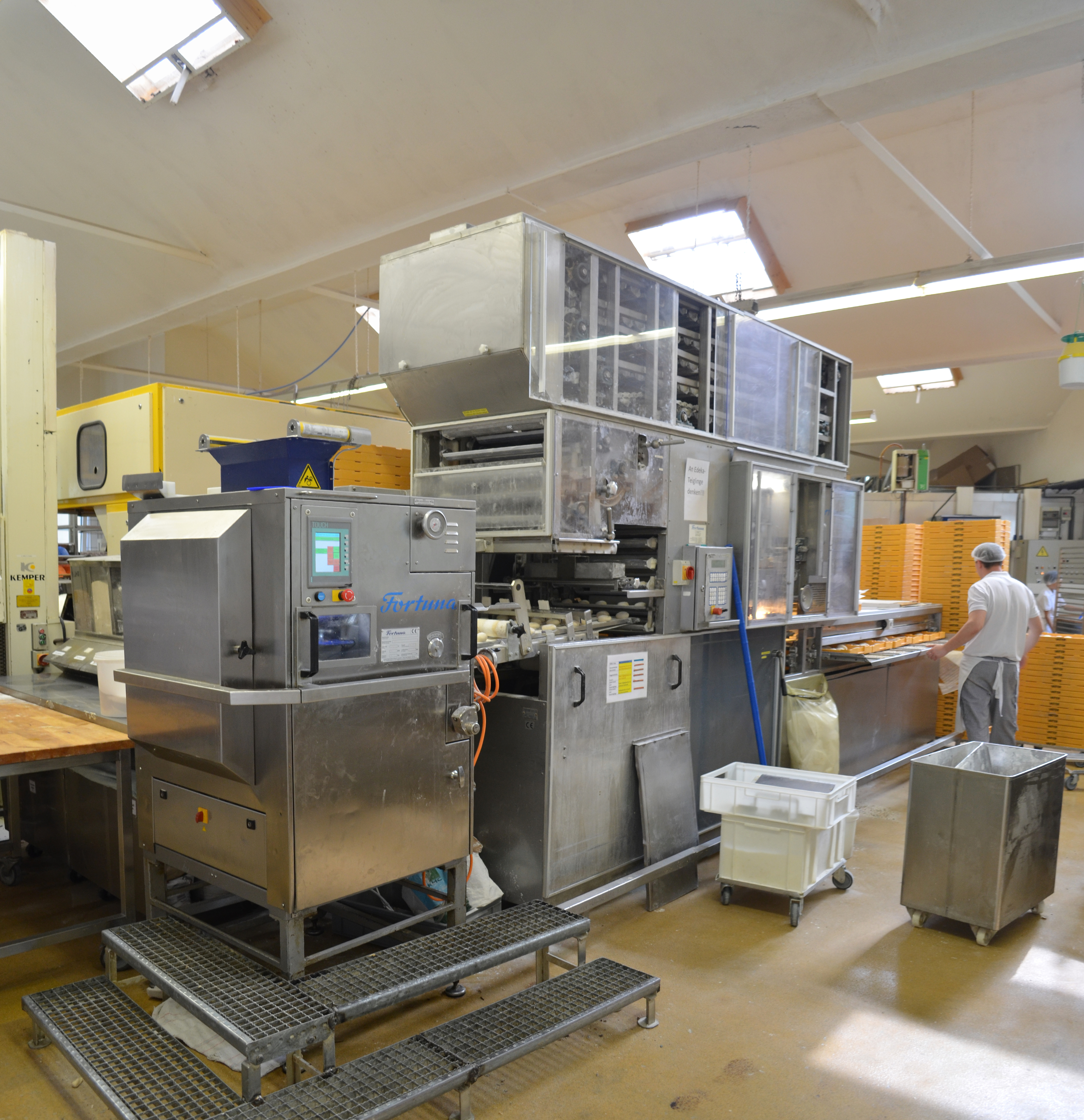 Fortuna Brötchenmaschine